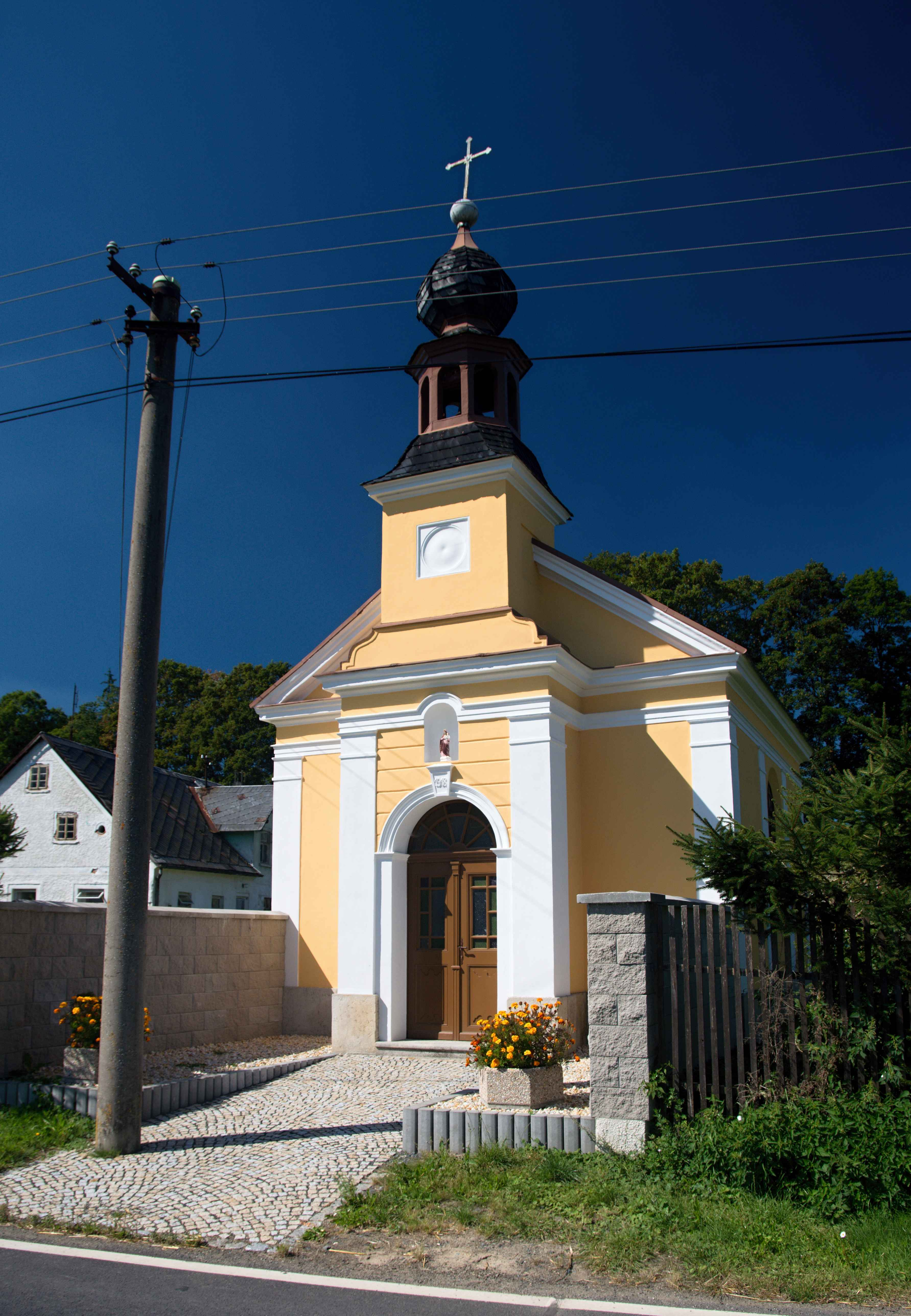 Velký Rapotín Kaplička z roku 1918